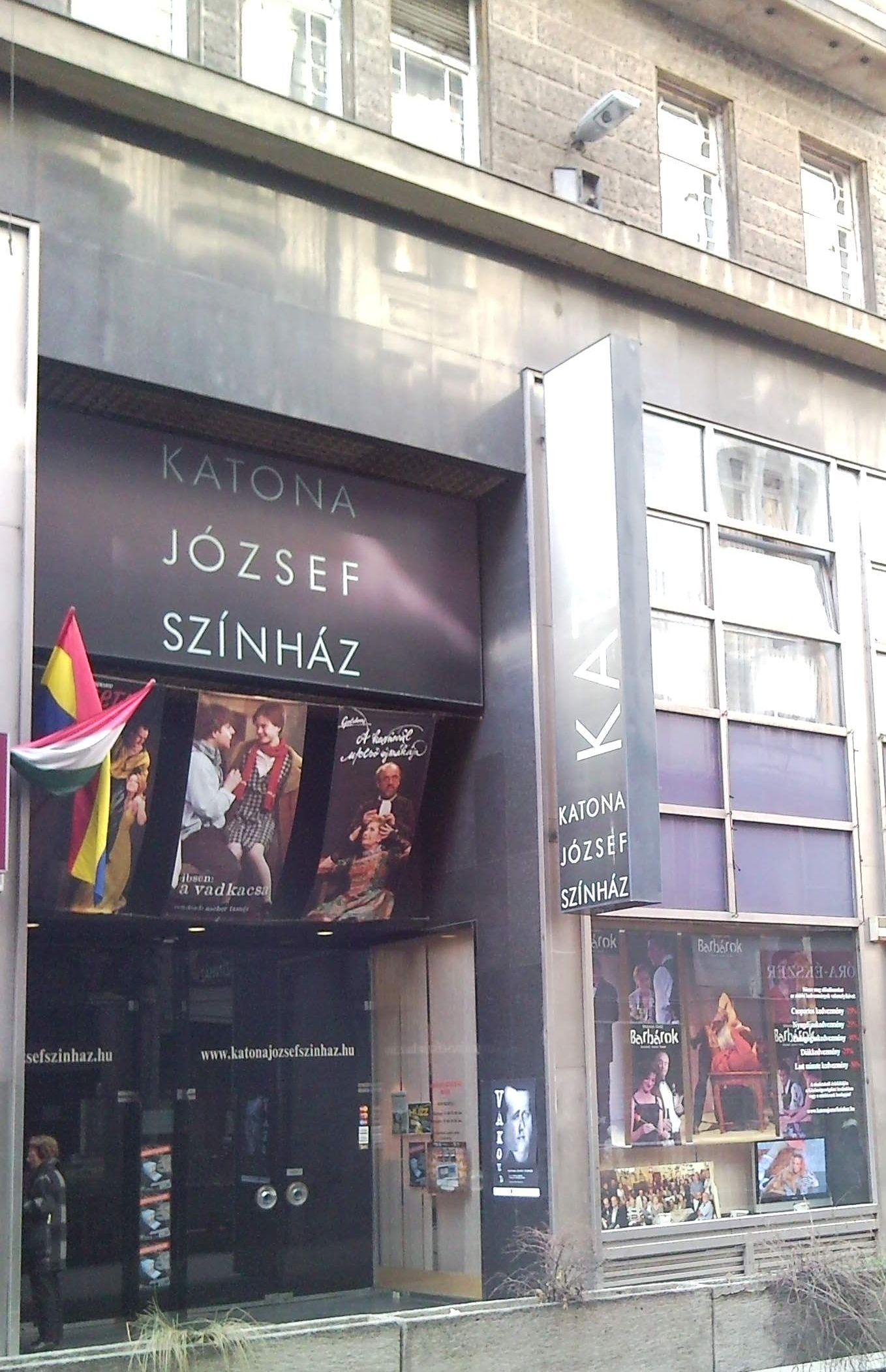 Budapesti Katona József Színház bejárata